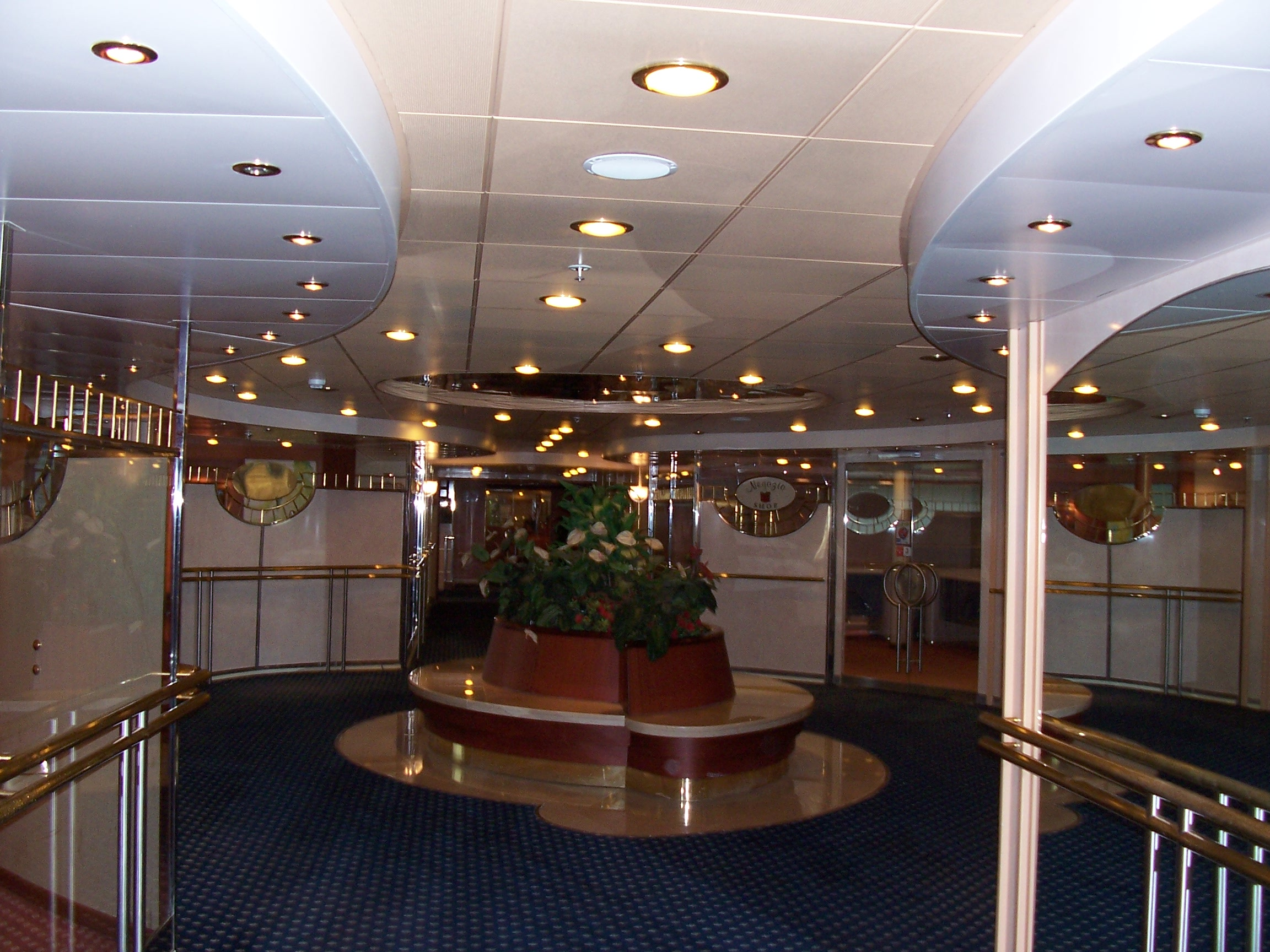 Galleria nave traghetto Janas of Tirrenia di Navigazione